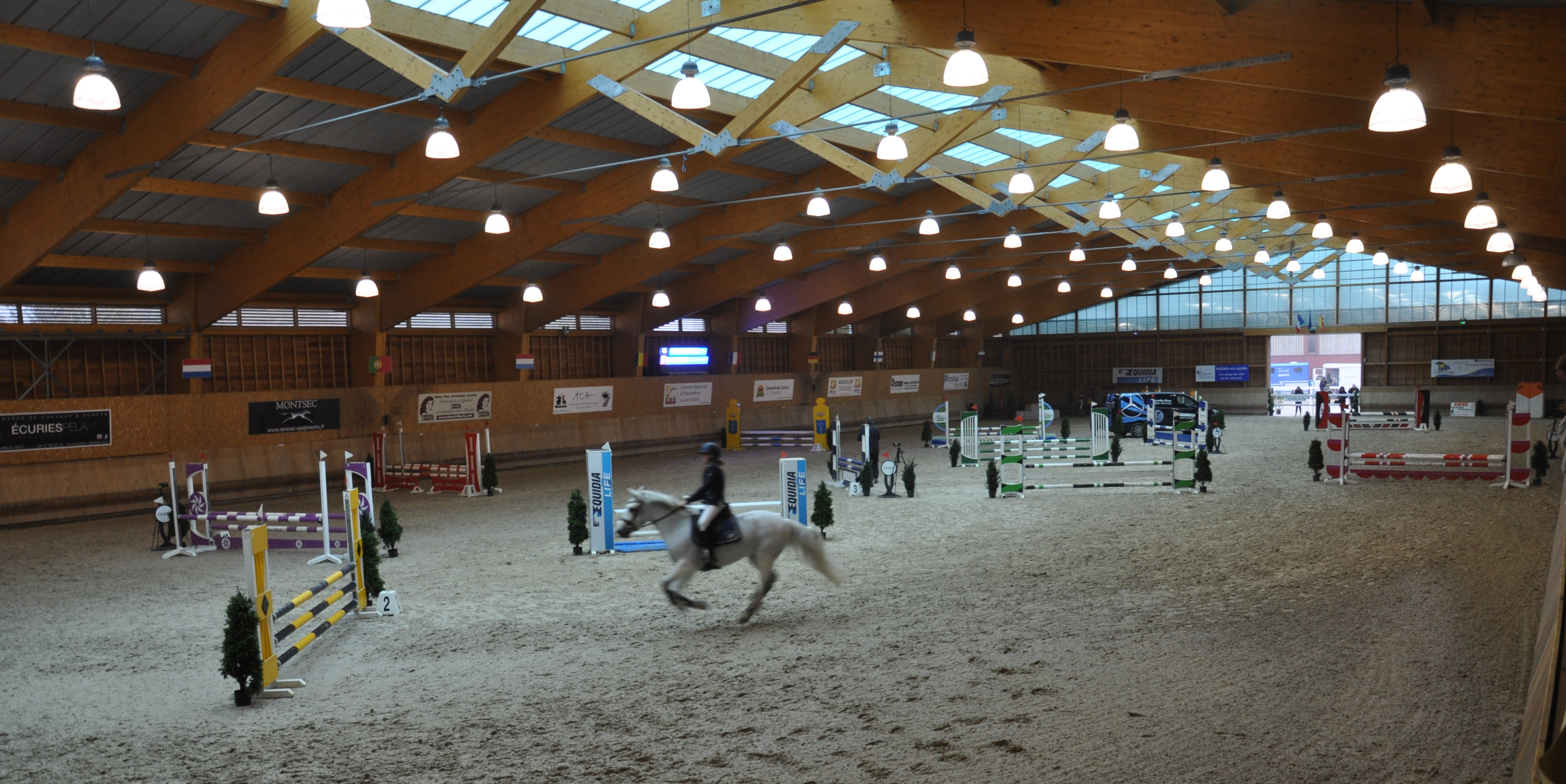 Intérieur du manège des Haras de Rosières-aux-Salines en Meurthe-et-Moselle, Lorraine, France